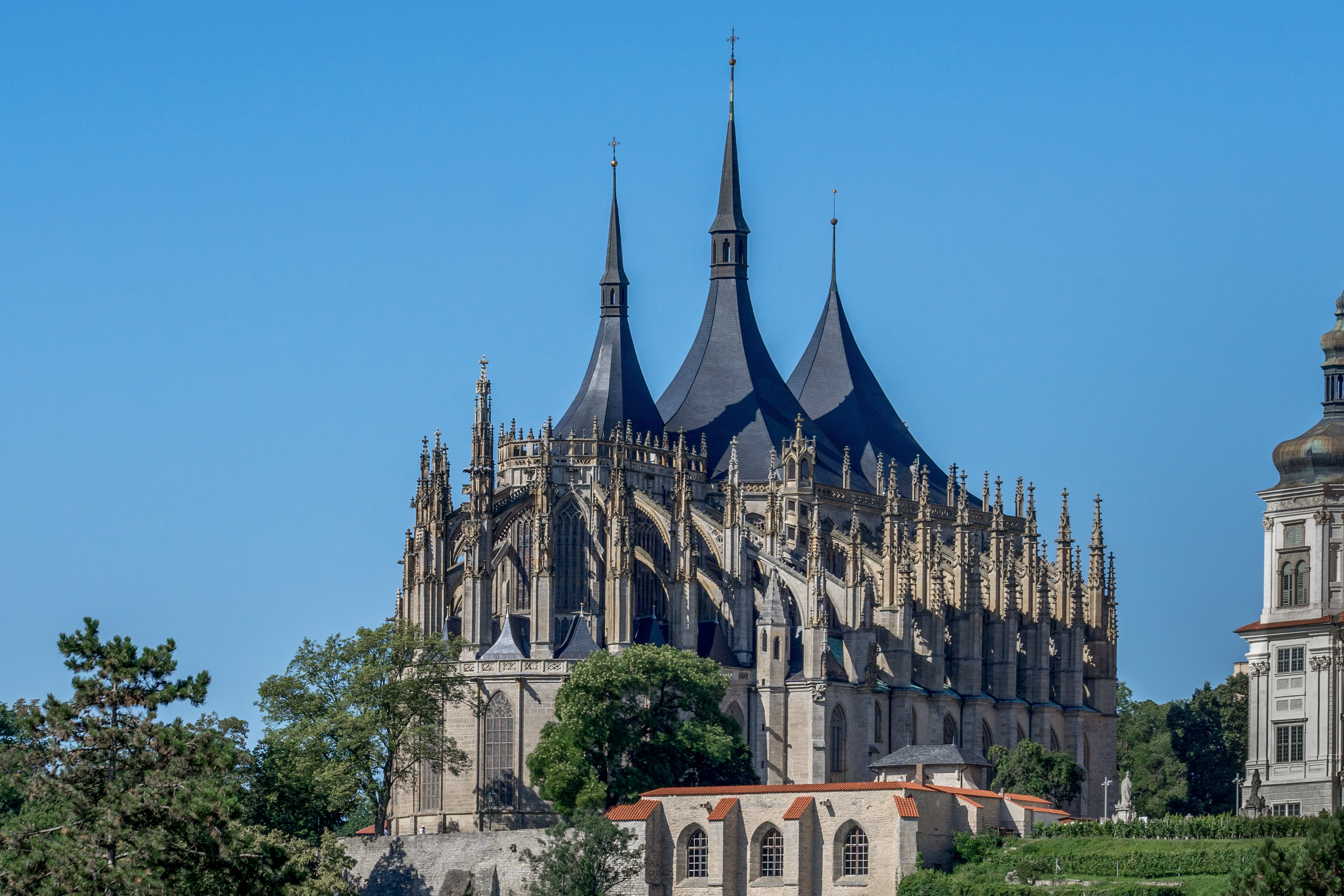 Church of Saint Barbara, North Facade, Kurna Hora